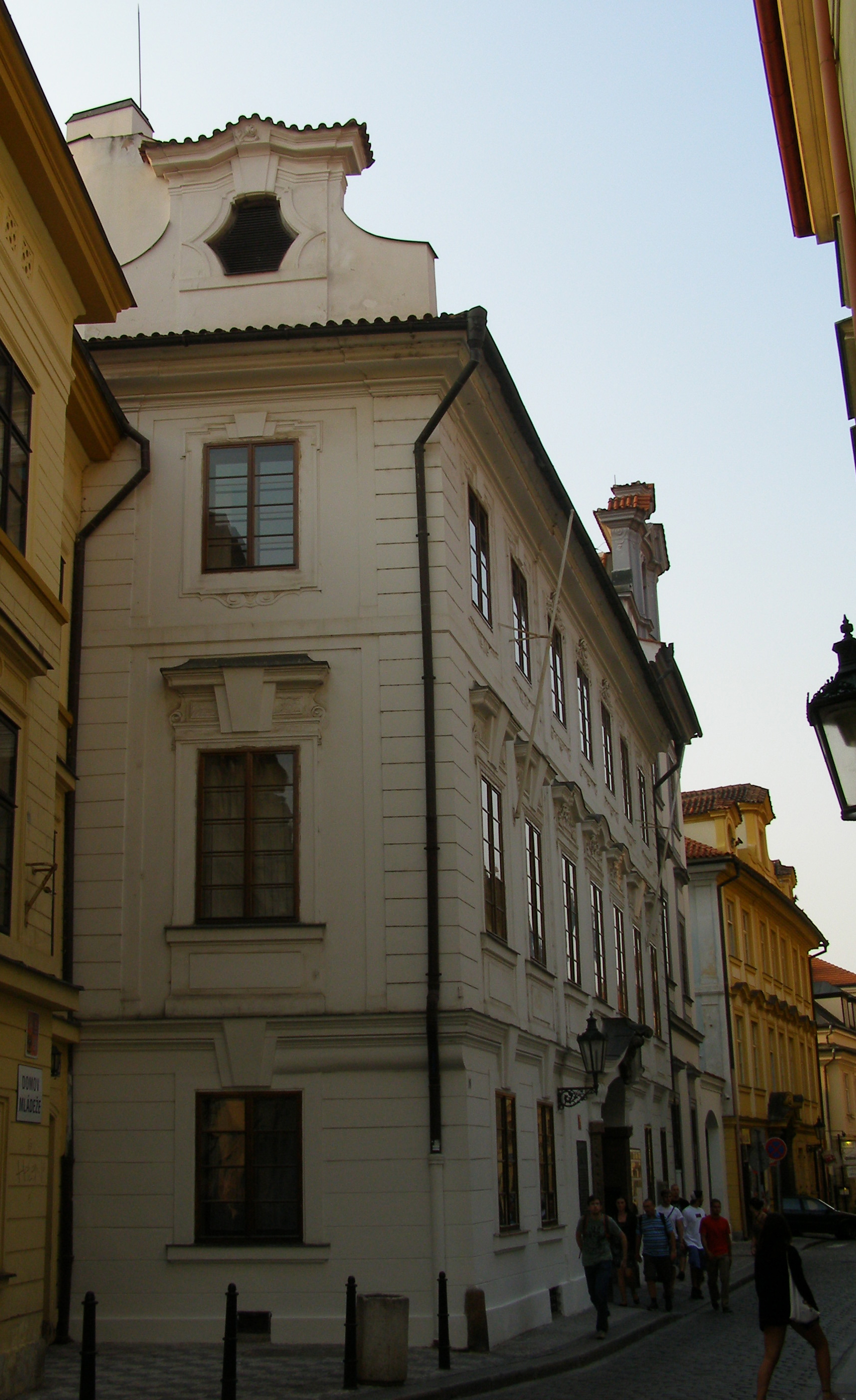 Seminář - Svatováclavský seminář (Stará technika) (Staré Město), Praha 1, Husova, Zlatá 240/5, Staré Město